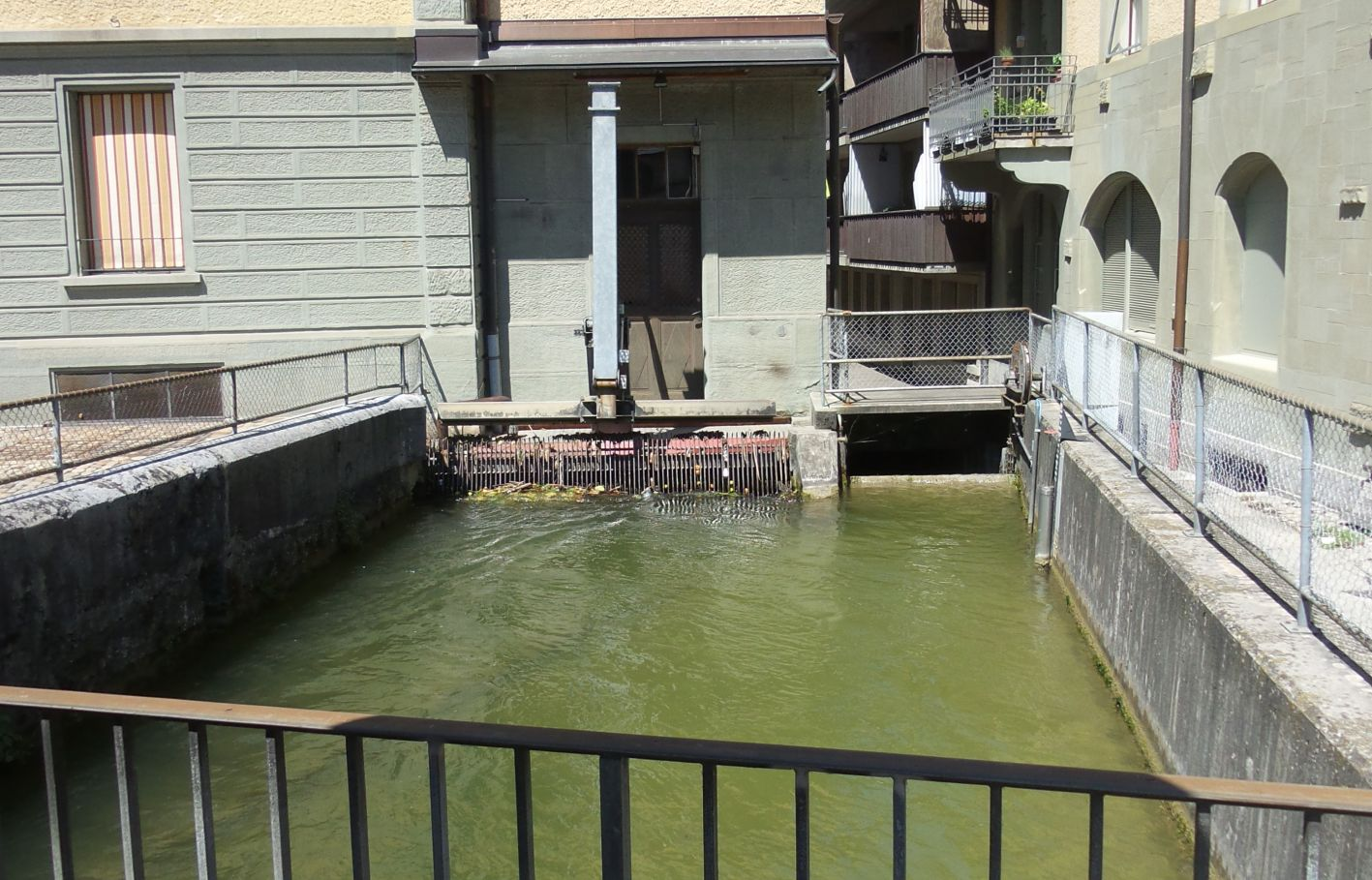 Burgdorf/Bern: Einlauf zu Kraftwerk in alter Mühle Dürr